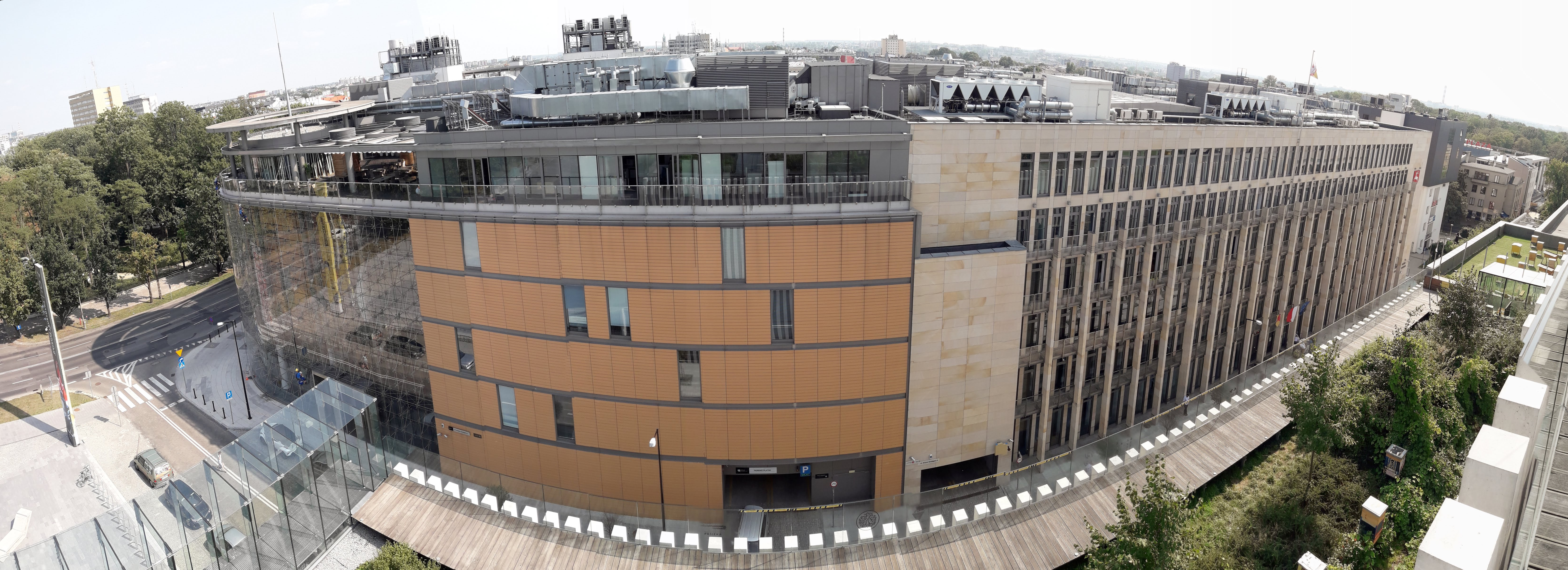 Lubelskie Centrum Konferencyjne i Urząd Marszałkowski Województwa Lubelskiego, widok z Centrum Spotkania Kultur w Lublinie